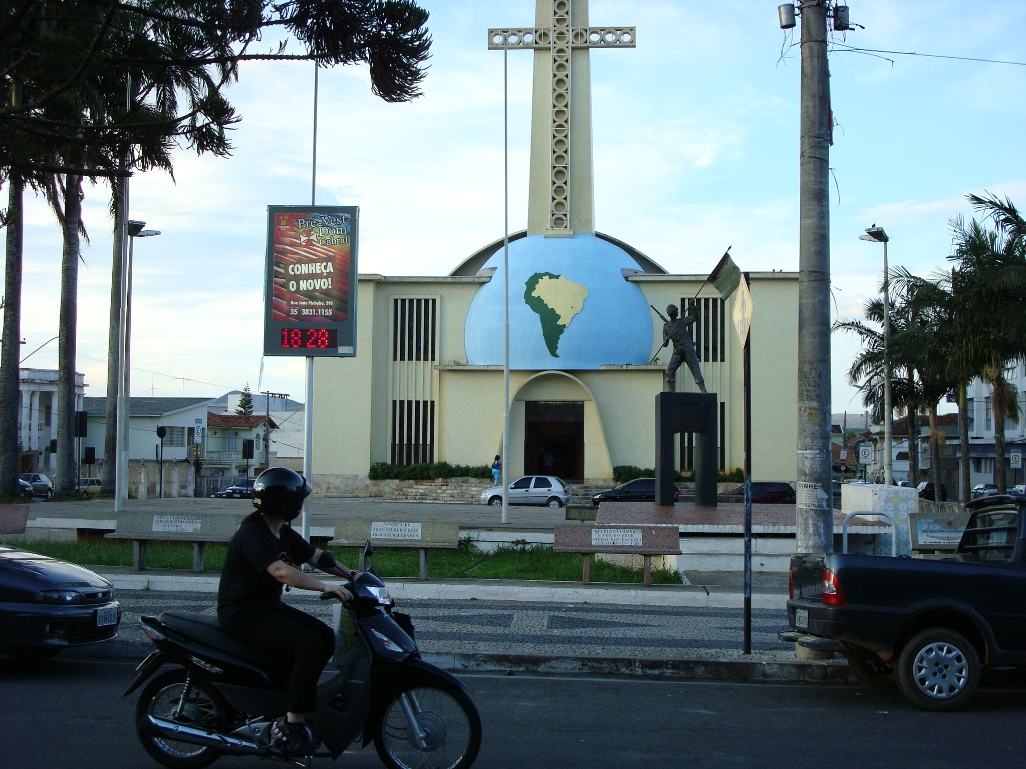 nova matriz (no plano inicial se vê soldado em homenagem aos expedicionários Campo-Belenses)